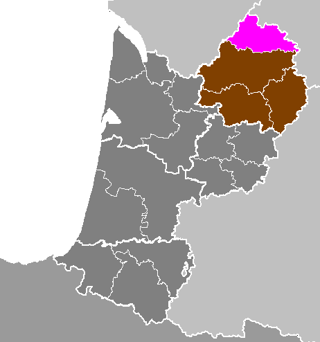 Maps of arrondissements and cantons of France: Département de la Dordogne - Arrondissement de Nontron.PNG (Région Aquitaine)